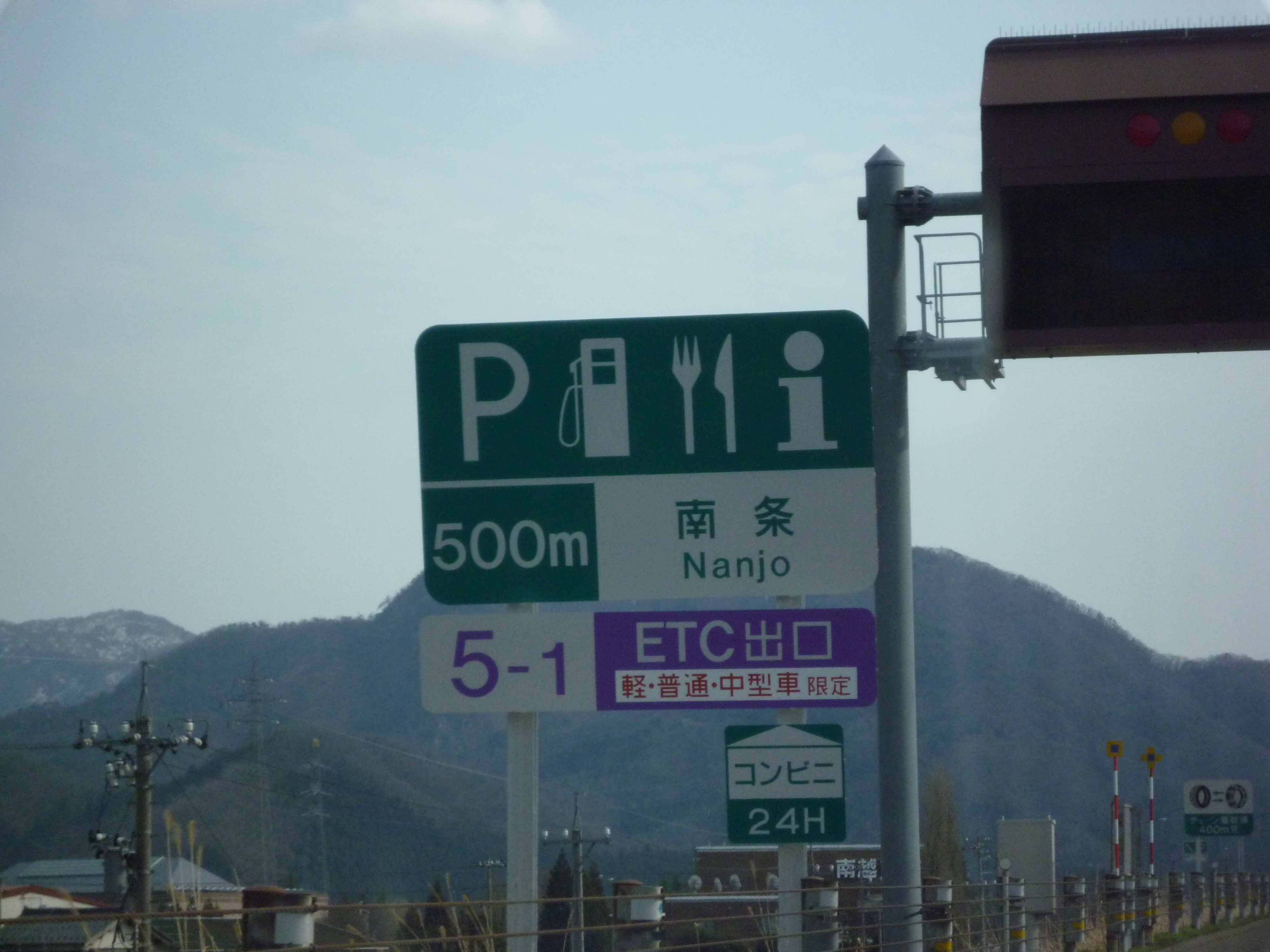 南条サービスエリア 標識 500m